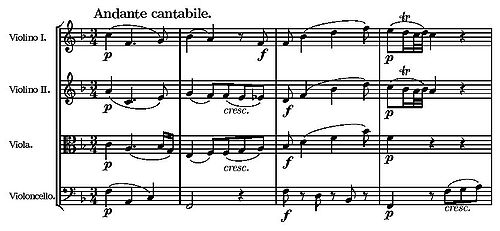 2º movimiento del Cuarteto de cuerda n.º 19 (Mozart)